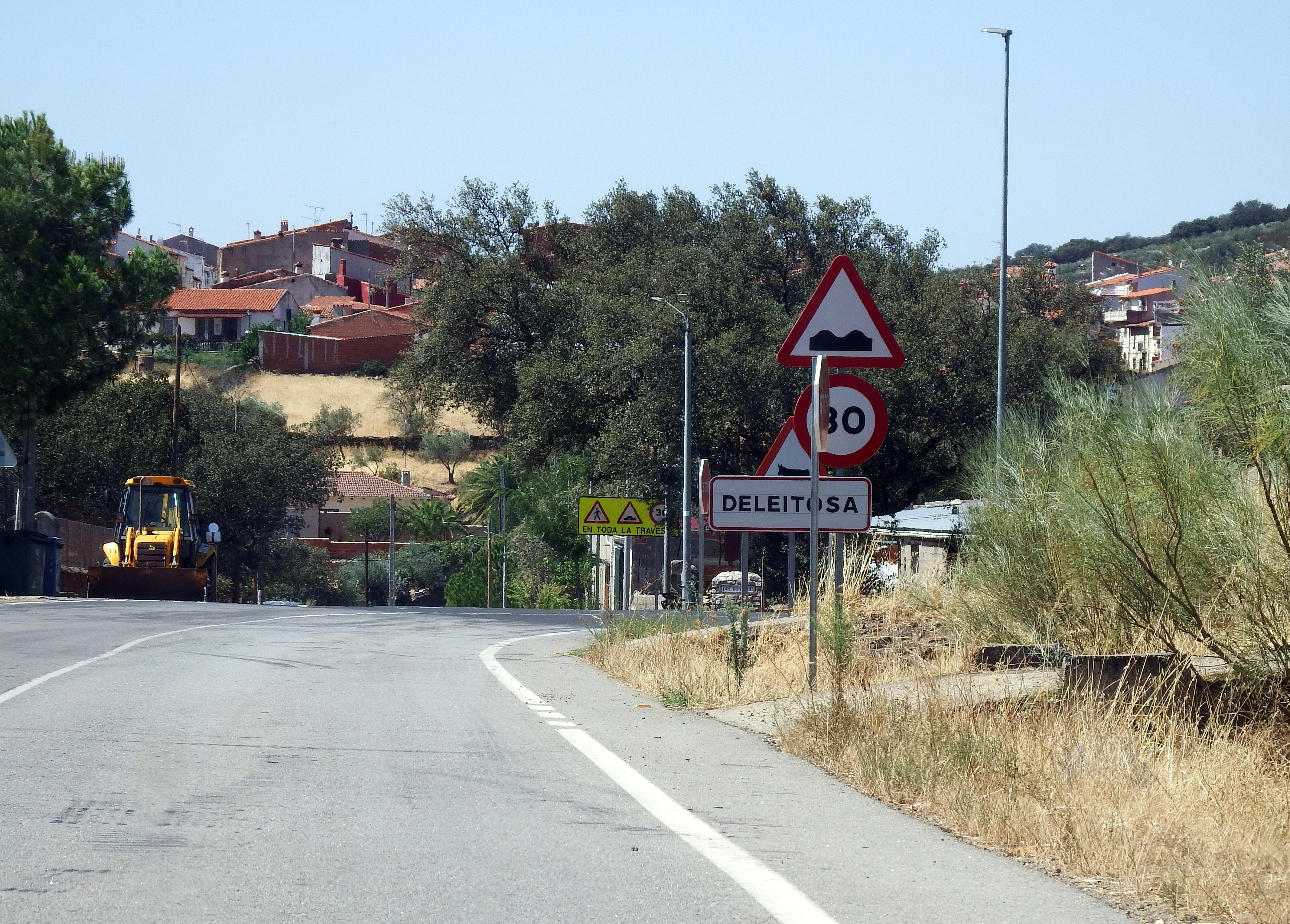 Deleitosa, Cáceres